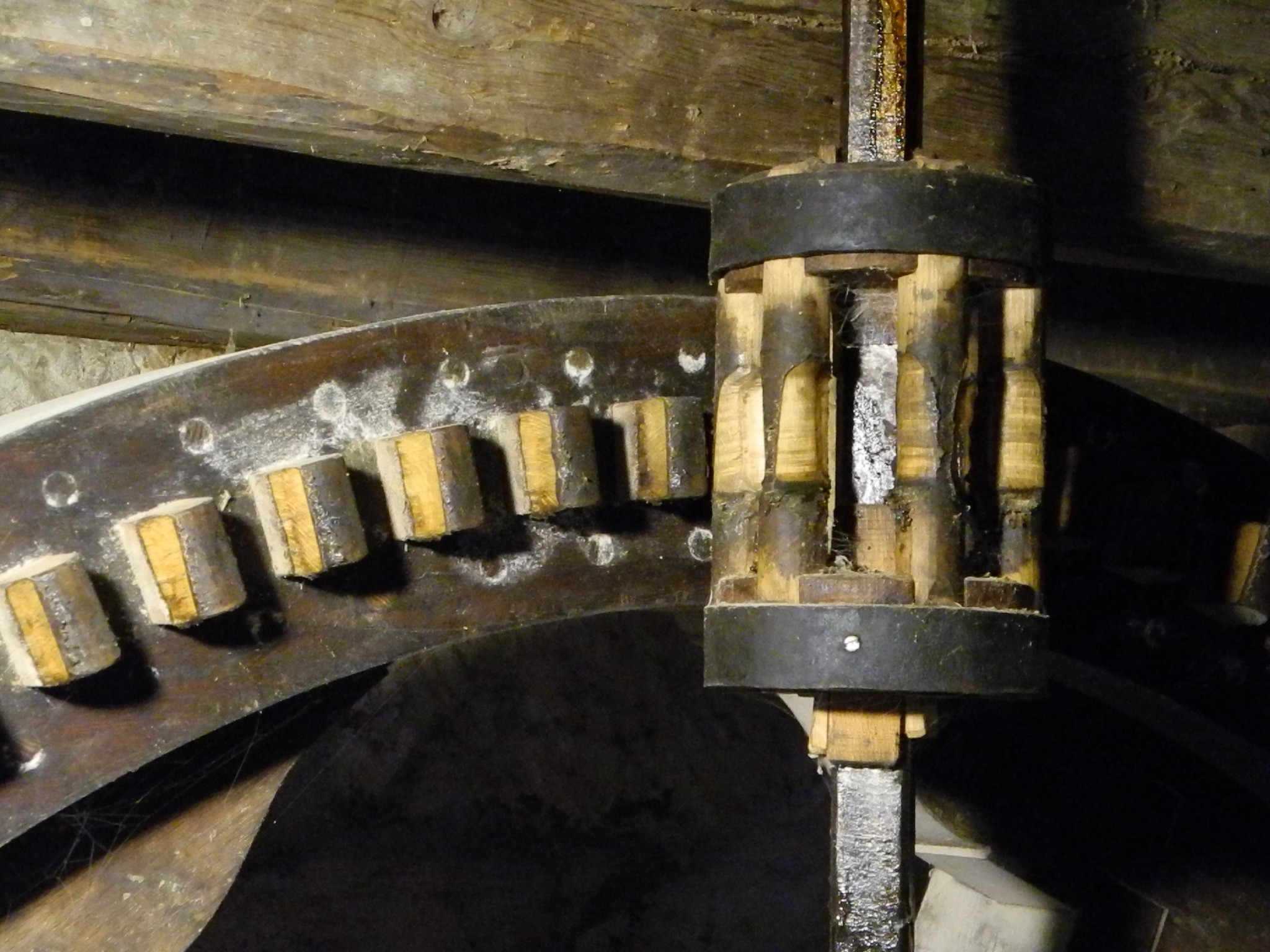 Bad Windsheim - Fränkisches Freilandmuseum, Mühle 1575, Räderwerk